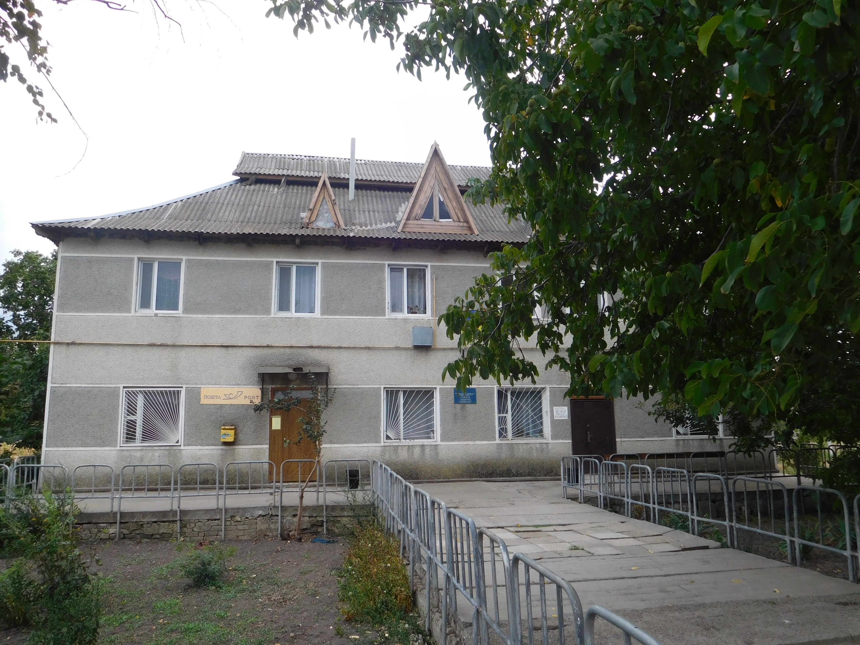 Контора старости с. Новопетрівка, із відділенням пошти. Вікіекспедиція Північ Одещини